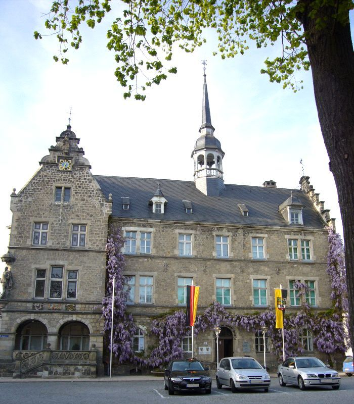 Rathaus der Stadt Lützen